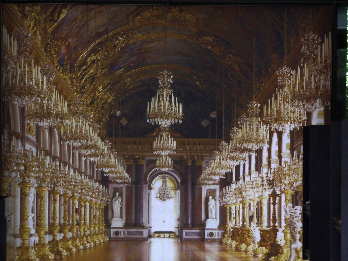 Neues Schloss Herrenchiemsee, Spiegelgalerie